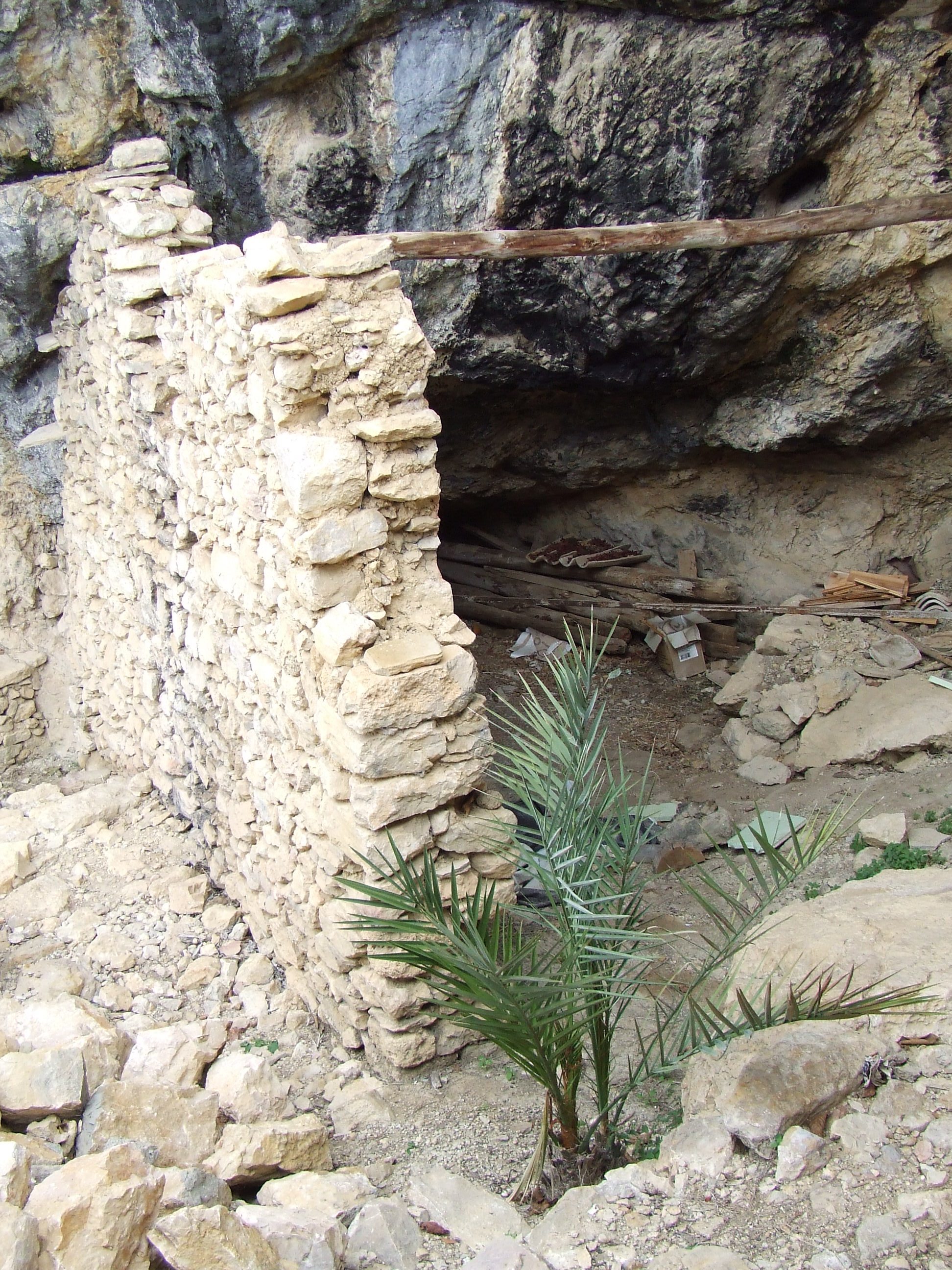 Casa Vella de Borrell (Abella de la Conca, Pallars Jussà)